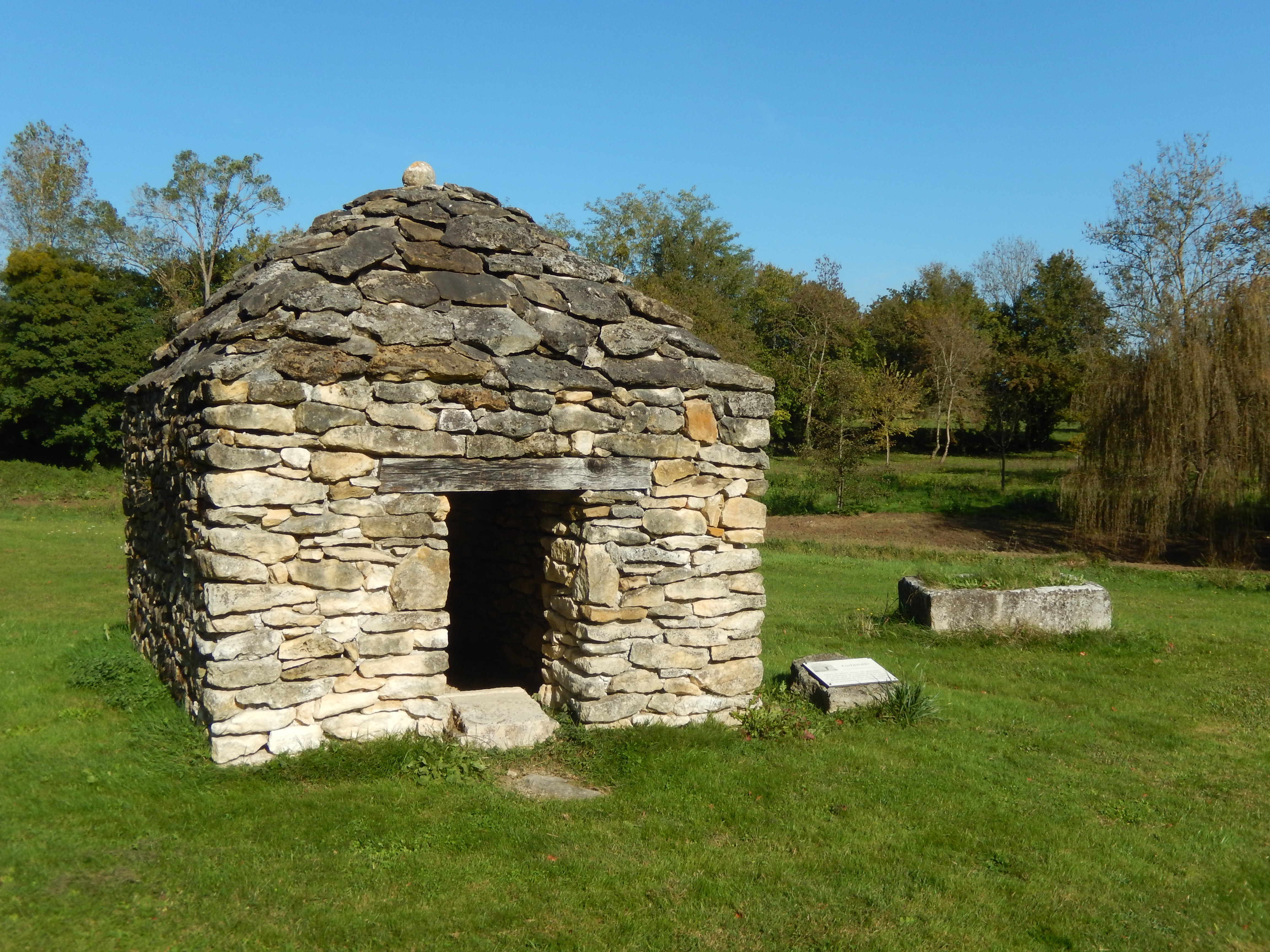 Une gabirotte est un petit abri en pierres sèches, dans lesquels les maraîchers rangeaient leurs outils ou se protégeaient des averses. Les gabirottes que l'on trouve dans les vallées de l'Arnoult et de la Seudre ont généralement un toit en forme de cône. Cette gabirotte carrée, qui se trouve dans la commune de La Clisse (Charente-Maritime, France), a été édifiée en 2006, non loin du jardin public. Une plaque signale la participation du Lion's Club de Saujon à sa construction.